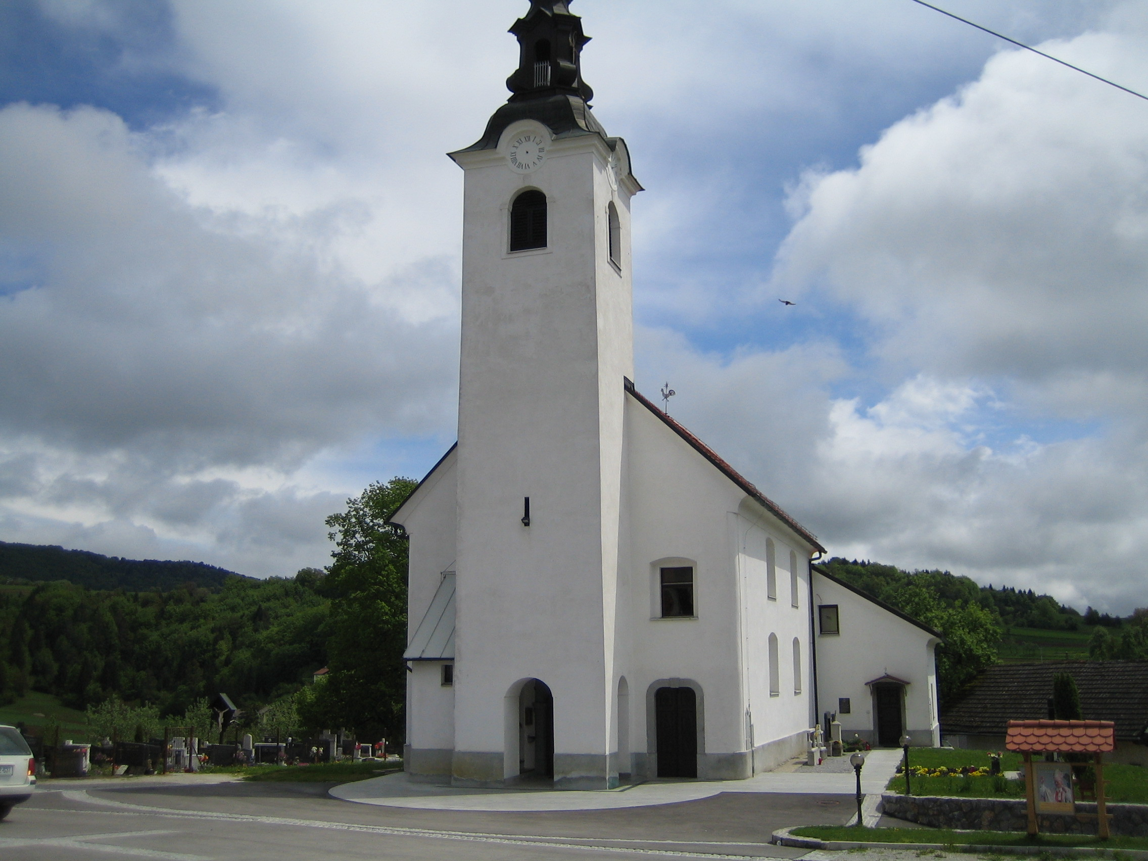 Fotografija cerkve v Polici